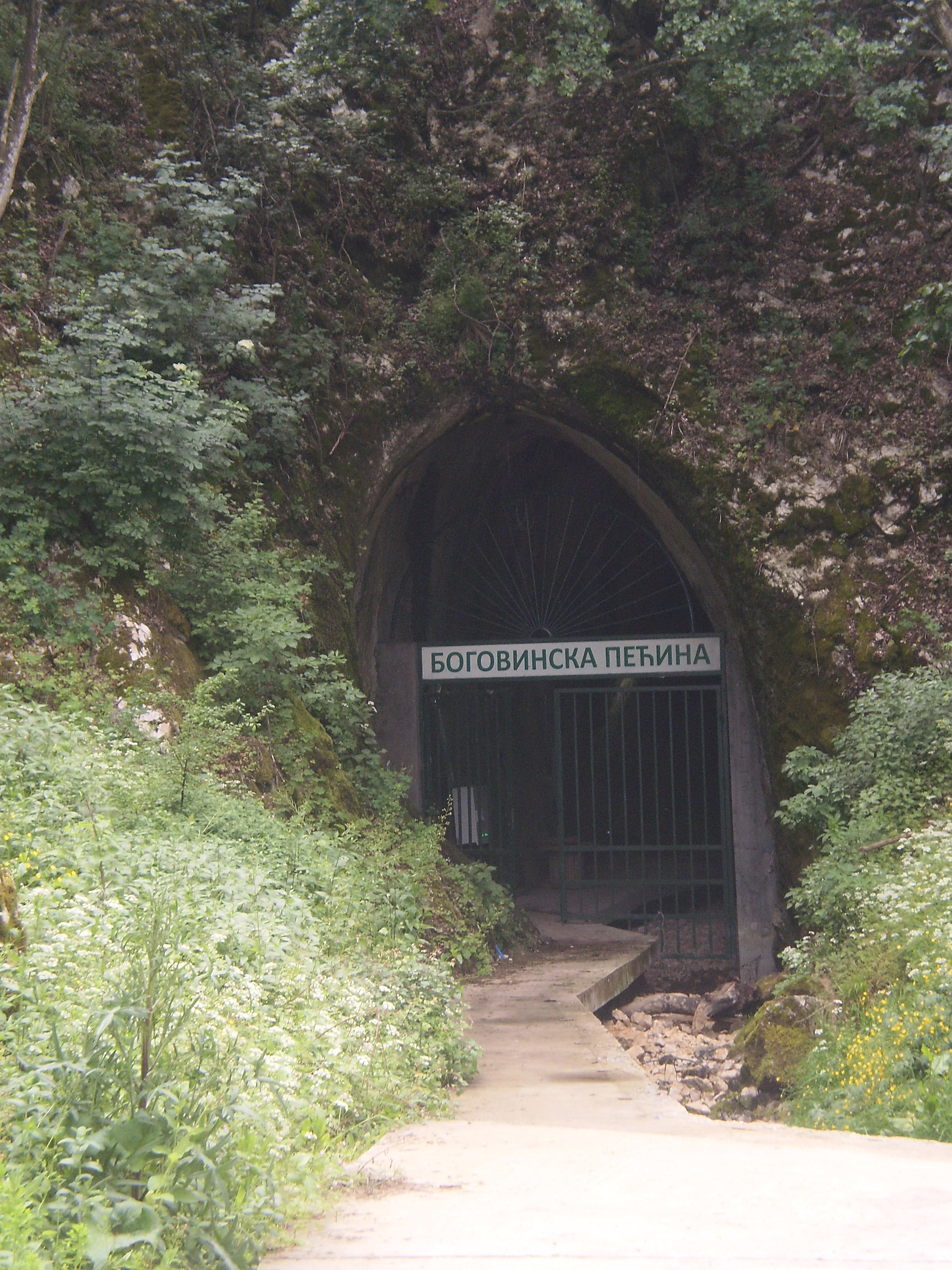 Српски (ћирилица): Улаз у пећину